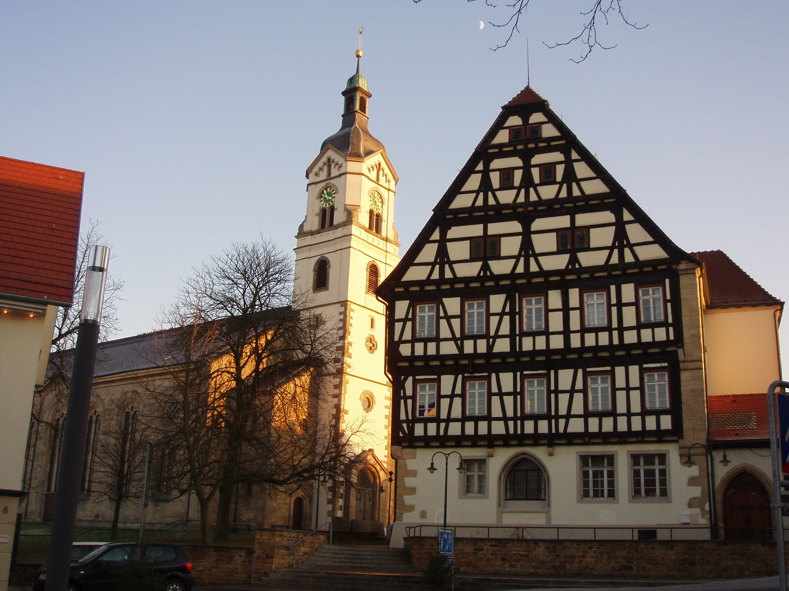 Neuhausen auf den Fildern, St. Peter und Paul mit dem oberen Schloss der Herren von Neuhausen, erbaut im Jahre 1518